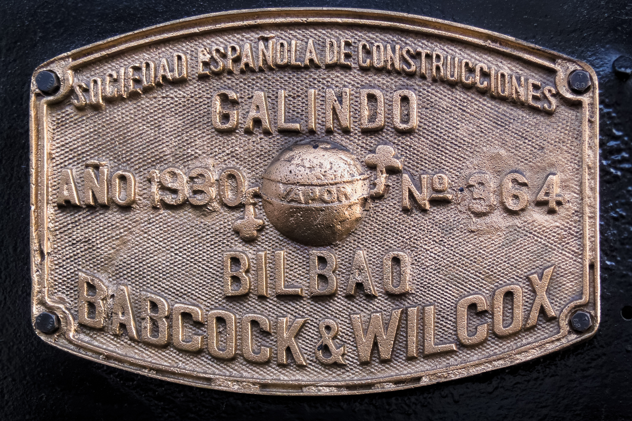 Locomotora de vapor 231-2006. Rodaje tipo pacific (Babcock & Wilcox, España, 1930). Expuesta en el Museo del Ferrocarril, Madrid.